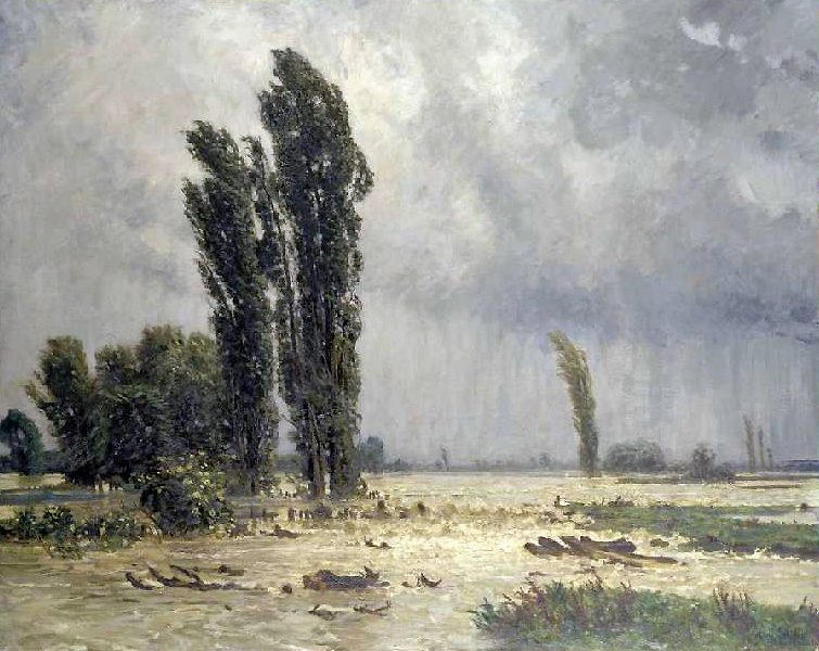 Überschwemmungtitle QS:P1476,de:"Überschwemmung" label QS:Lde,"Überschwemmung"